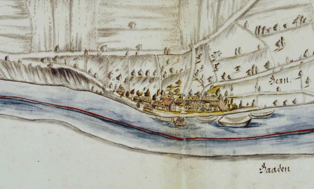 Ansicht des Dorfes Stilli Ausschnitt aus dem March-Buch des Samuel Bodmer, Band 2, Seite 32.